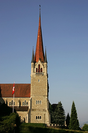 Kirche St. Michael